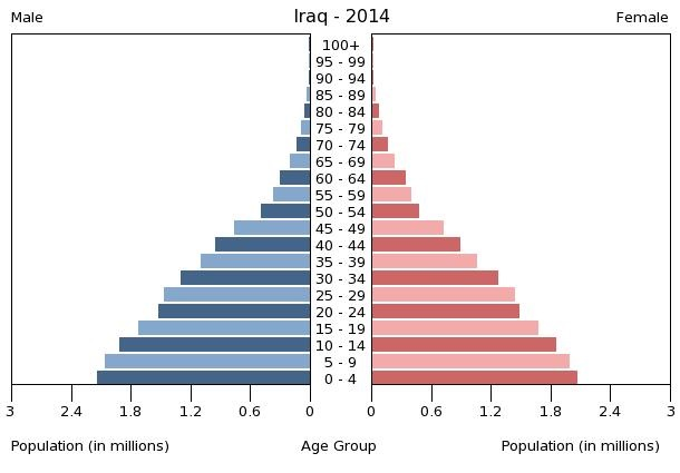 Bevölkerungspyramide des Iraks 2014